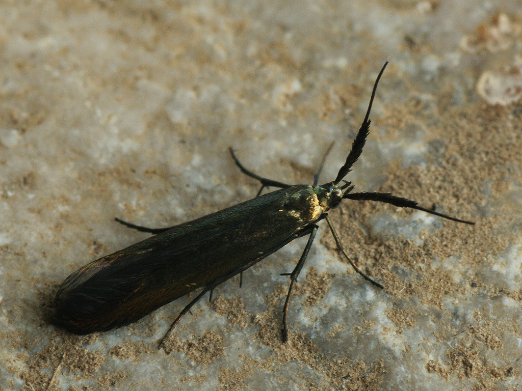 Exemplar found: Russia, Moscow Oblast, Odintsovsky District, near village Pestovo, 01.07.2017, by light МО, Одинцовский р-н, окрестности деревни Пестово, 01.07.2017, на свет